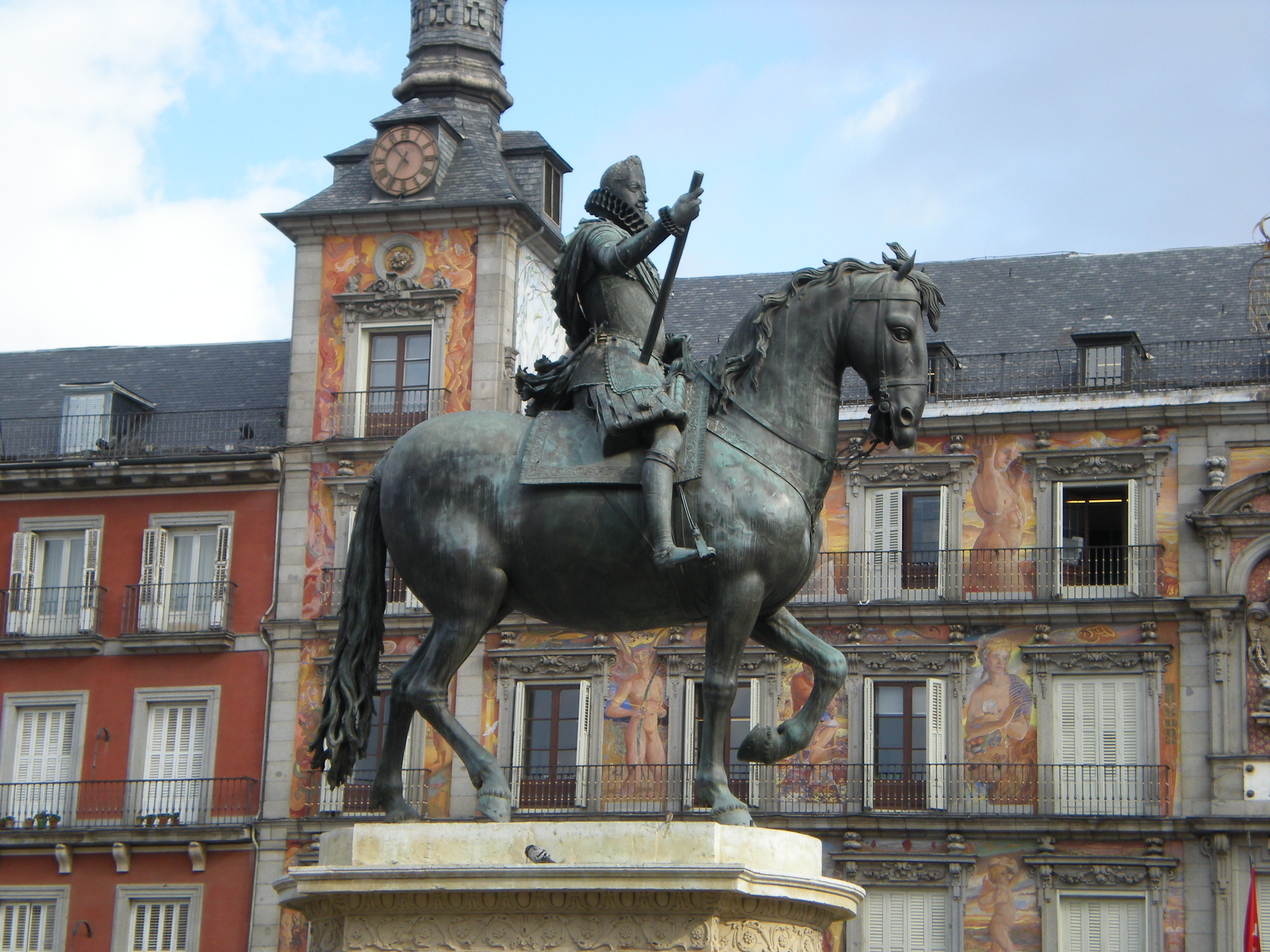 Plaza Mayor Madrid. Comunidad de Madrid. España